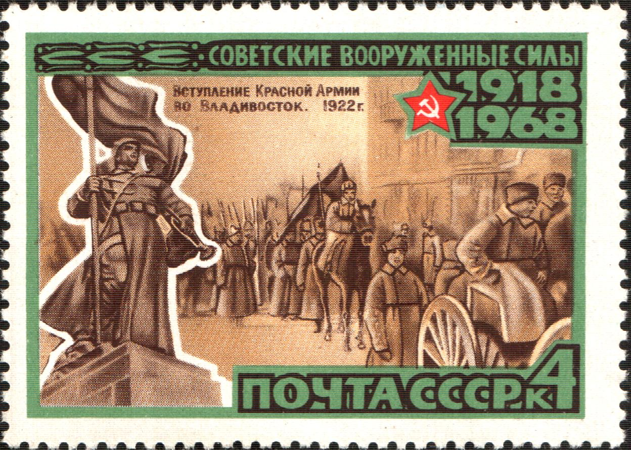 Почтовая марка СССР - 50 лет Вооруженных Сил СССР